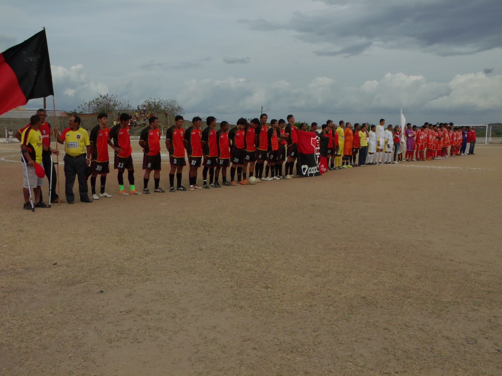 Sport e Sociedade na final do Campeonato Tabirense de 2011.